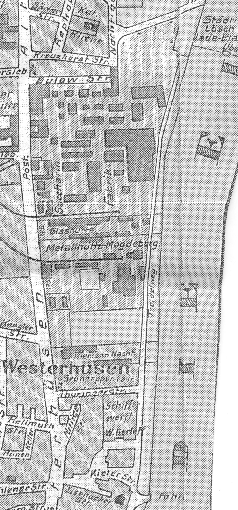 Betriebsgelände des Chemiewerks Fahlberg-List und nähere Umgebung